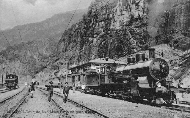 Il Simplon express fuori dal tunnel del sempione al valico d'Iselle nel 1906